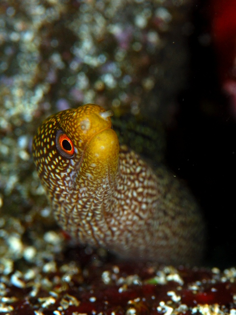 ワカウツボ(Gymnothorax eurostus)